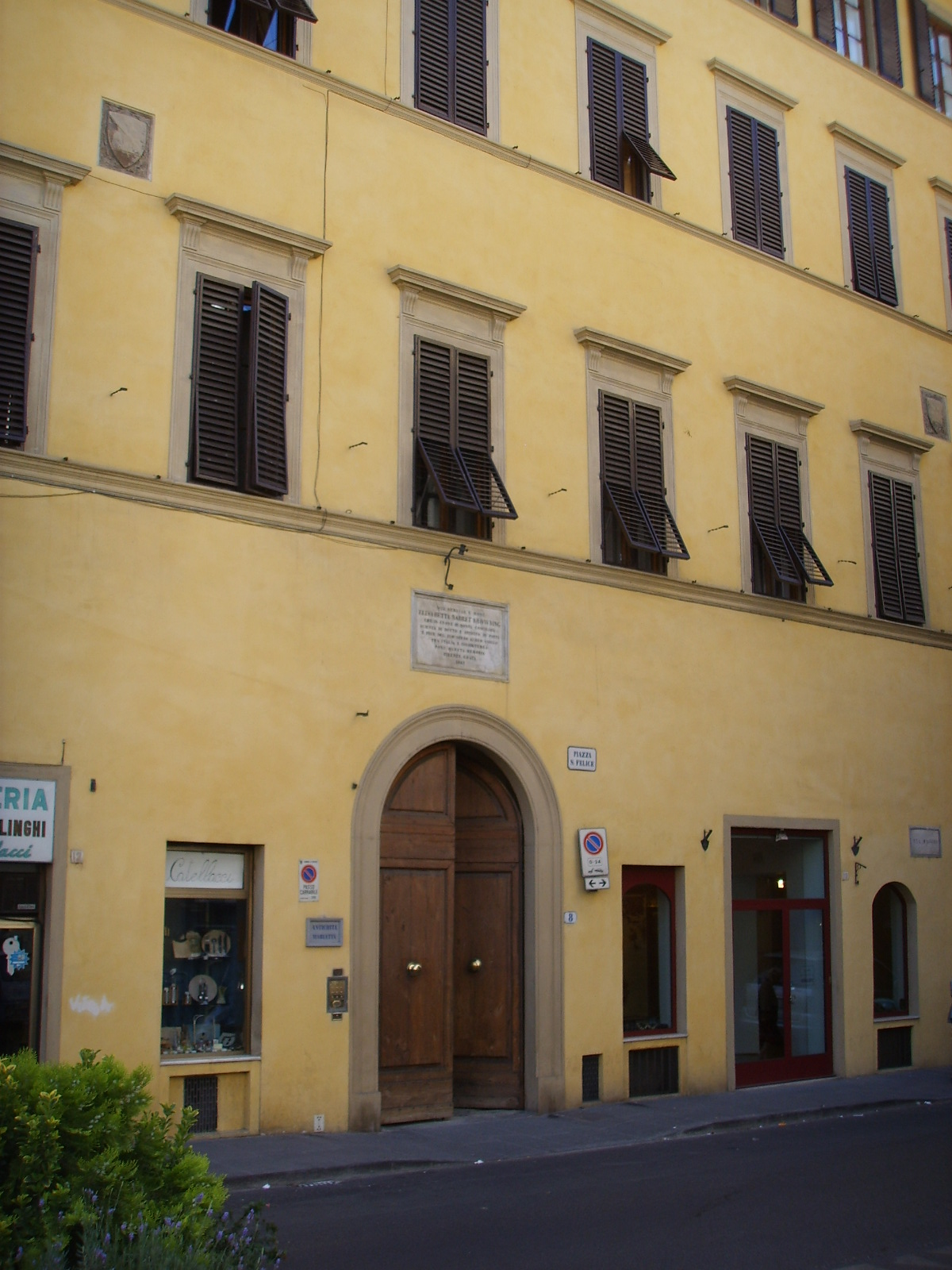 Casa Guidi museum in Florence, Italy